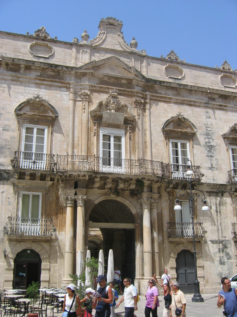 Facciata di Palazzo Beneventano del Bosco a Siracusa, in Piazza del Duomo.